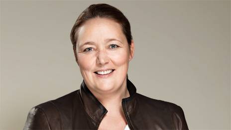 Hilde Magnusson Lydvo